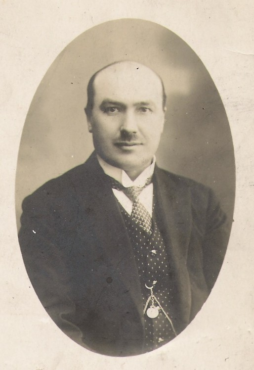 Burgemeester Gustaaf Colpaert